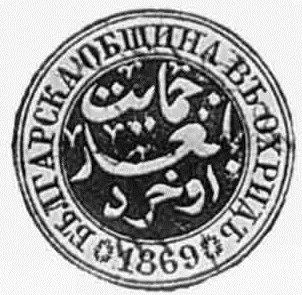 Печат на Охридската българска община